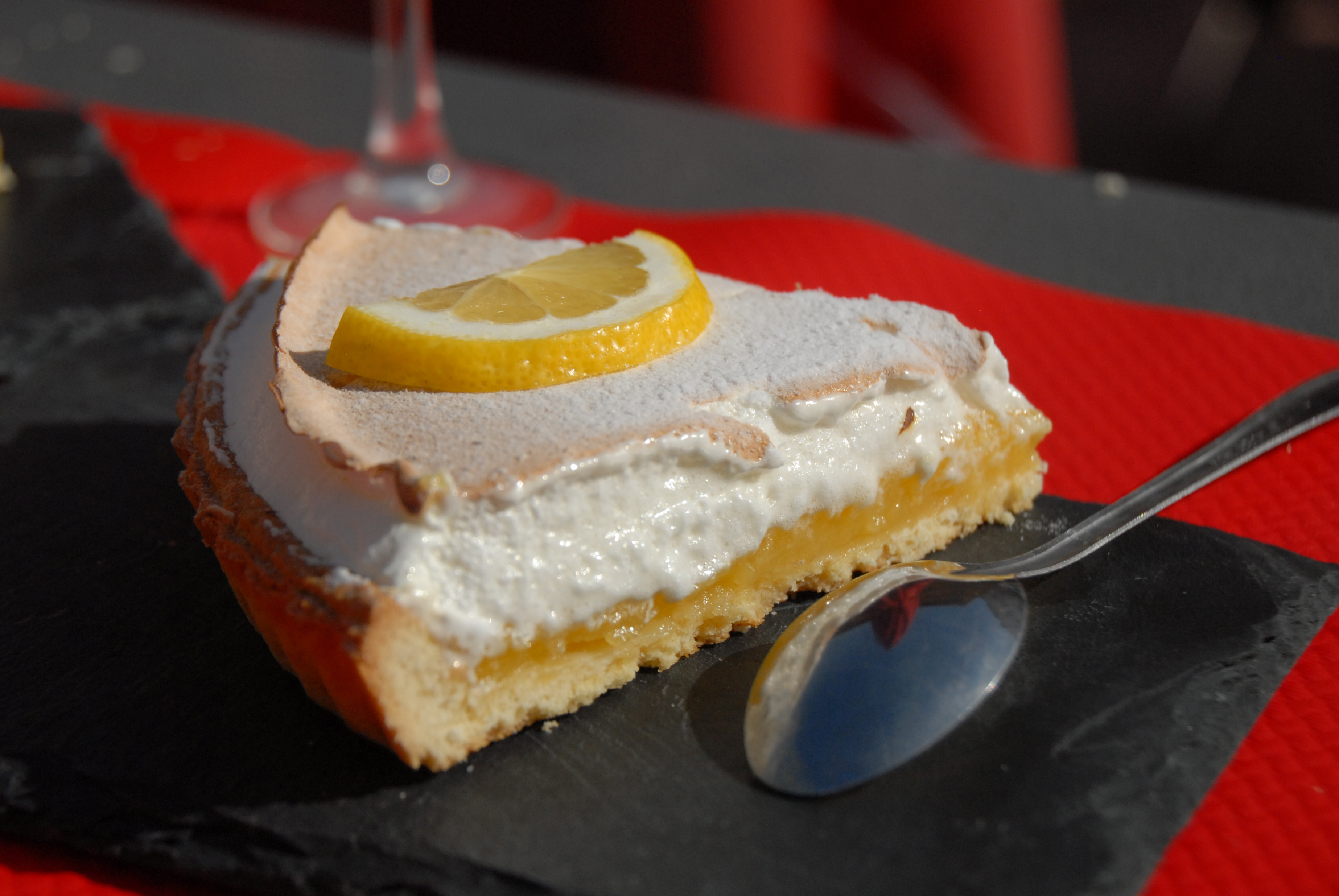 Une part de tarte au citron meringuée, servie dans un restaurant de Menton (France)